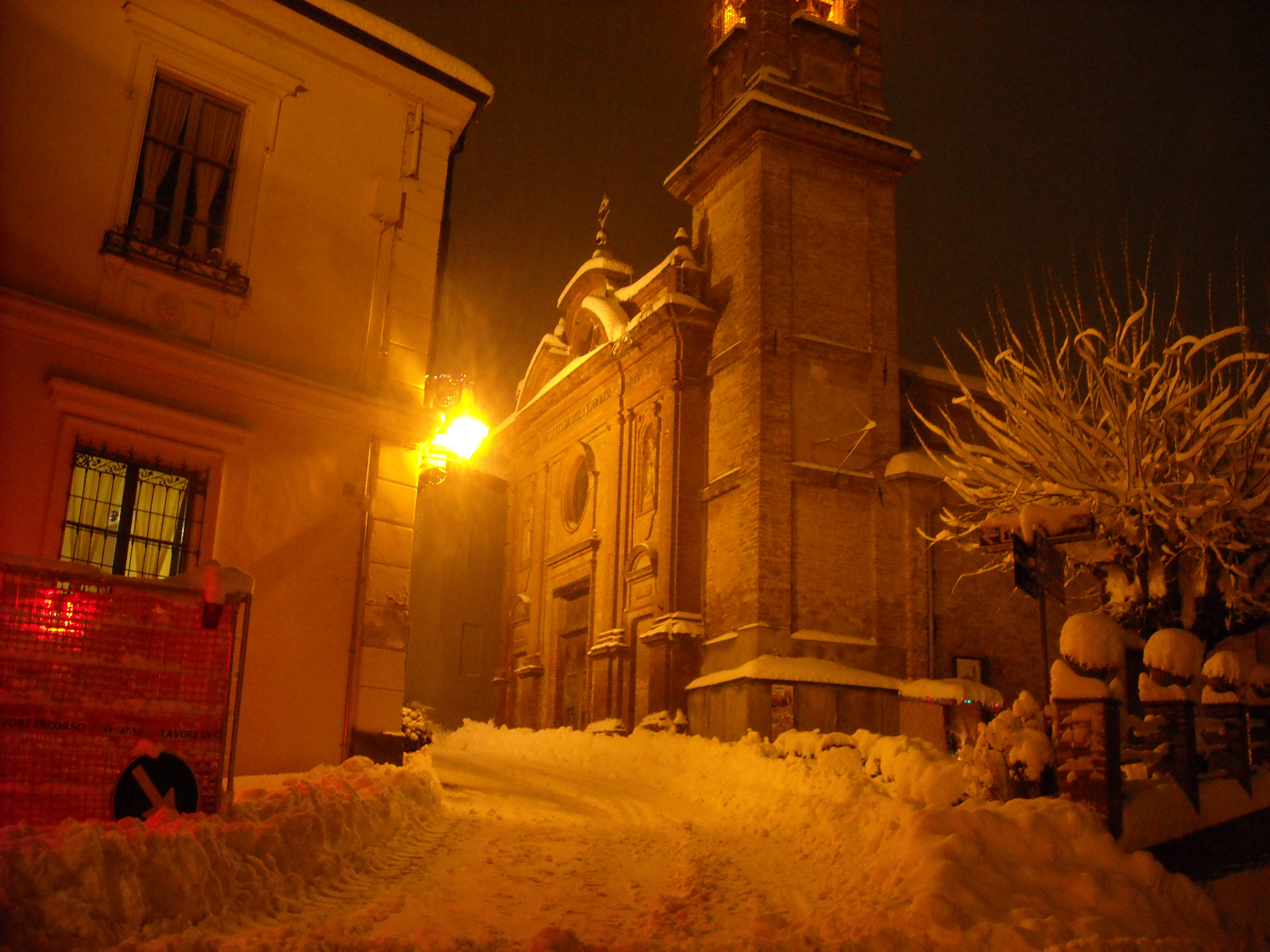 Scatto notturno della chiesa di San Michele sotto una forte nevicata.